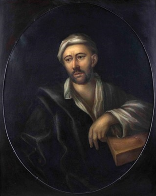 Андреас Гертнер (1654—1727). Аутор портрета није познат, створен пре 1727. године, види стр. 186: Erleuchtung der Welt: Sachsen und der Beginn der modernen Wissenschaften. Universität Leipzig. 2009